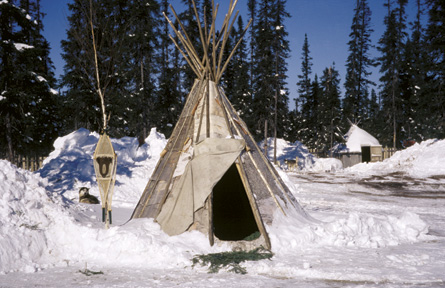 Tipi d’écorce - Oujé-Bougoumou, Baie-James / Bark teepee of James Baie (Québec, Canada)